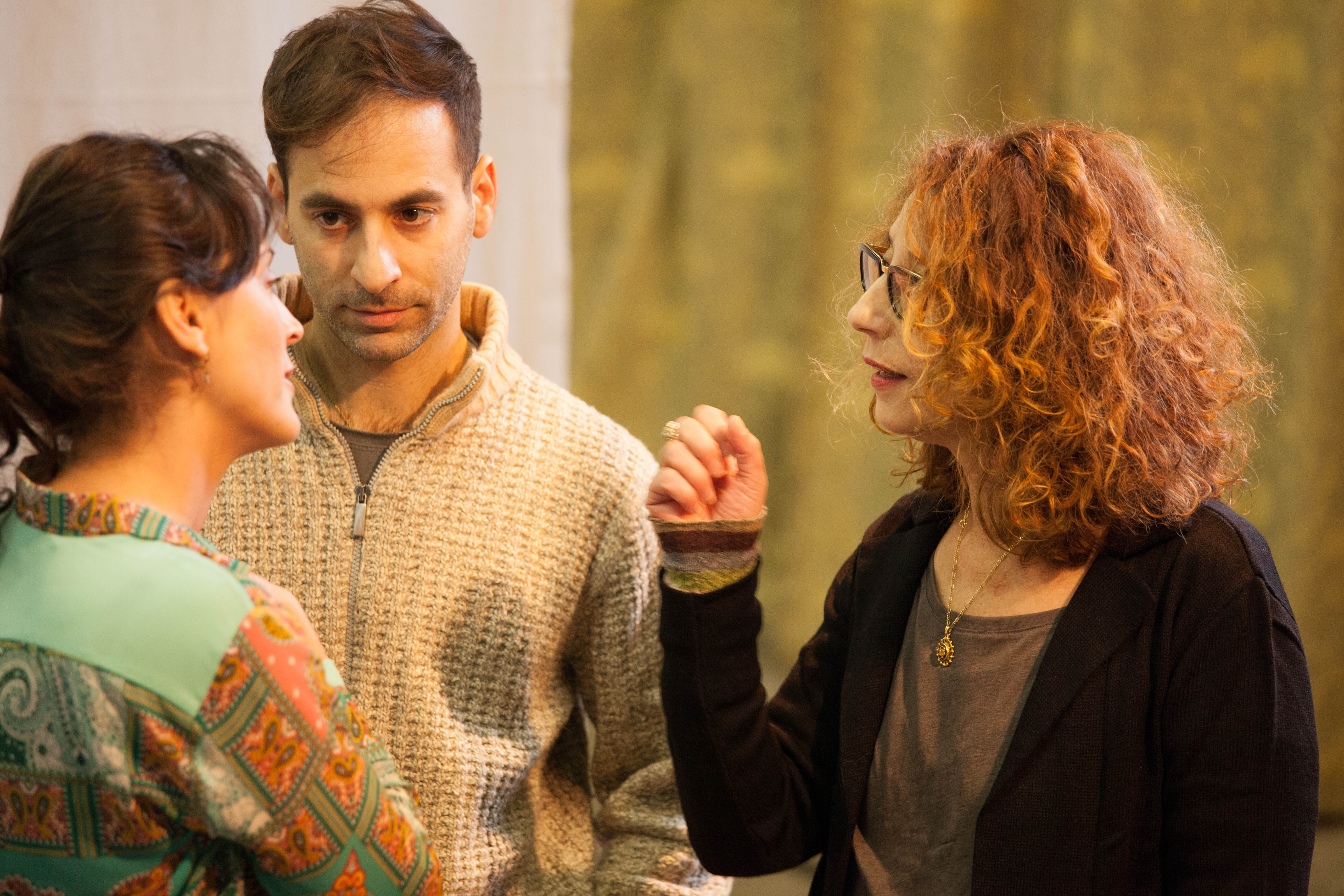 אורית אזולאי מעבירה סדנה בסדנאות הבמה